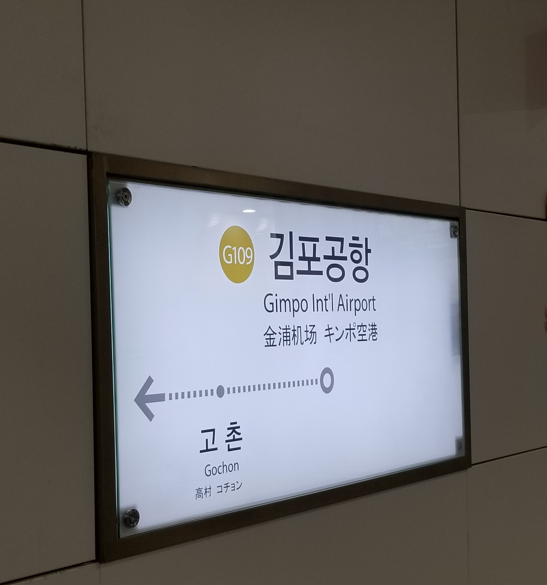 김포도시철도 김포공항역 역명판